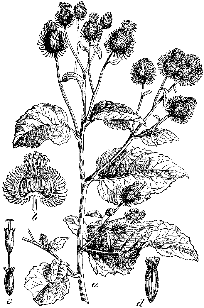 Slika 423. Repinec. (Láppa vulgáris [sic!].)